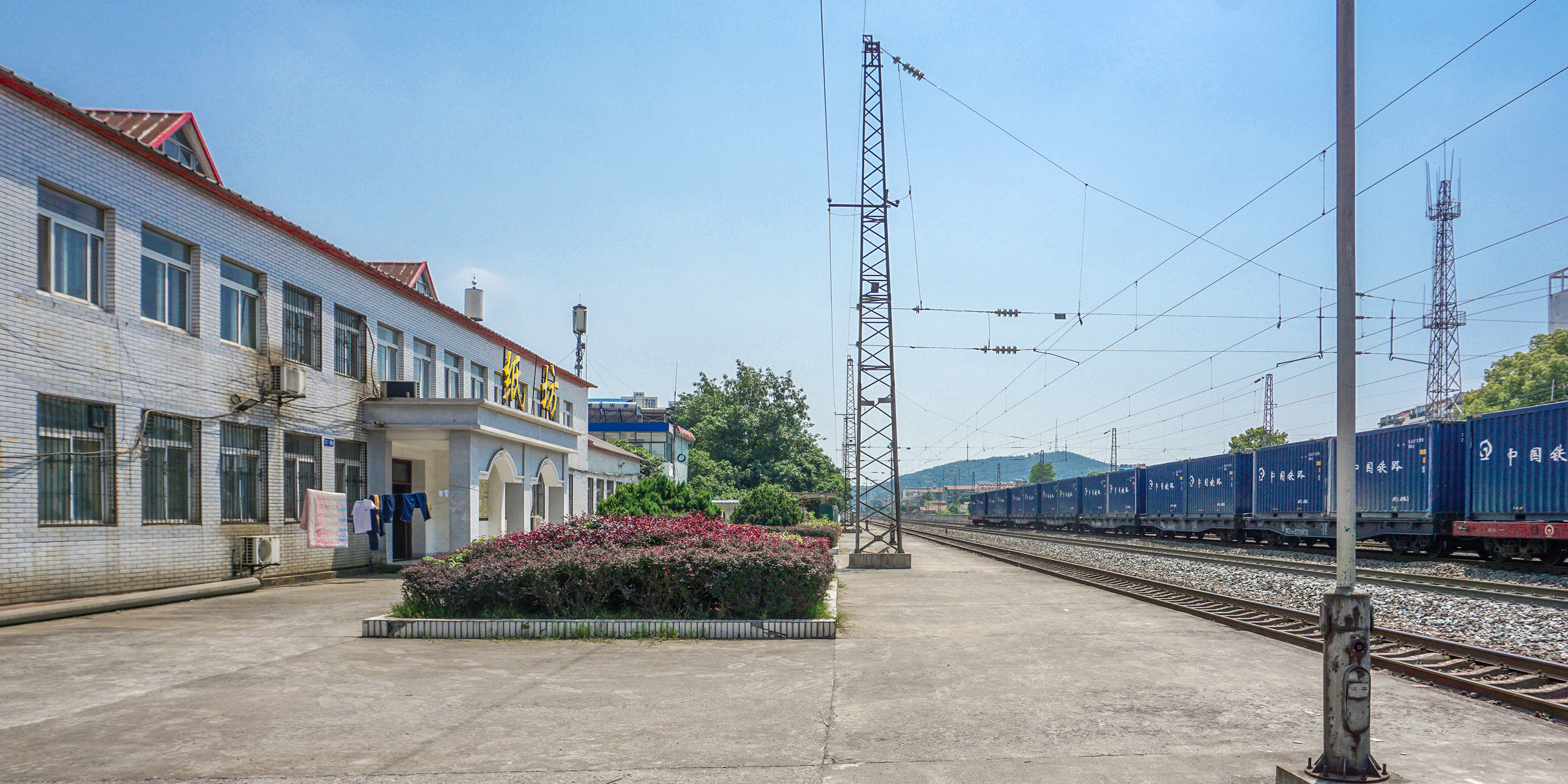 纸坊站站房